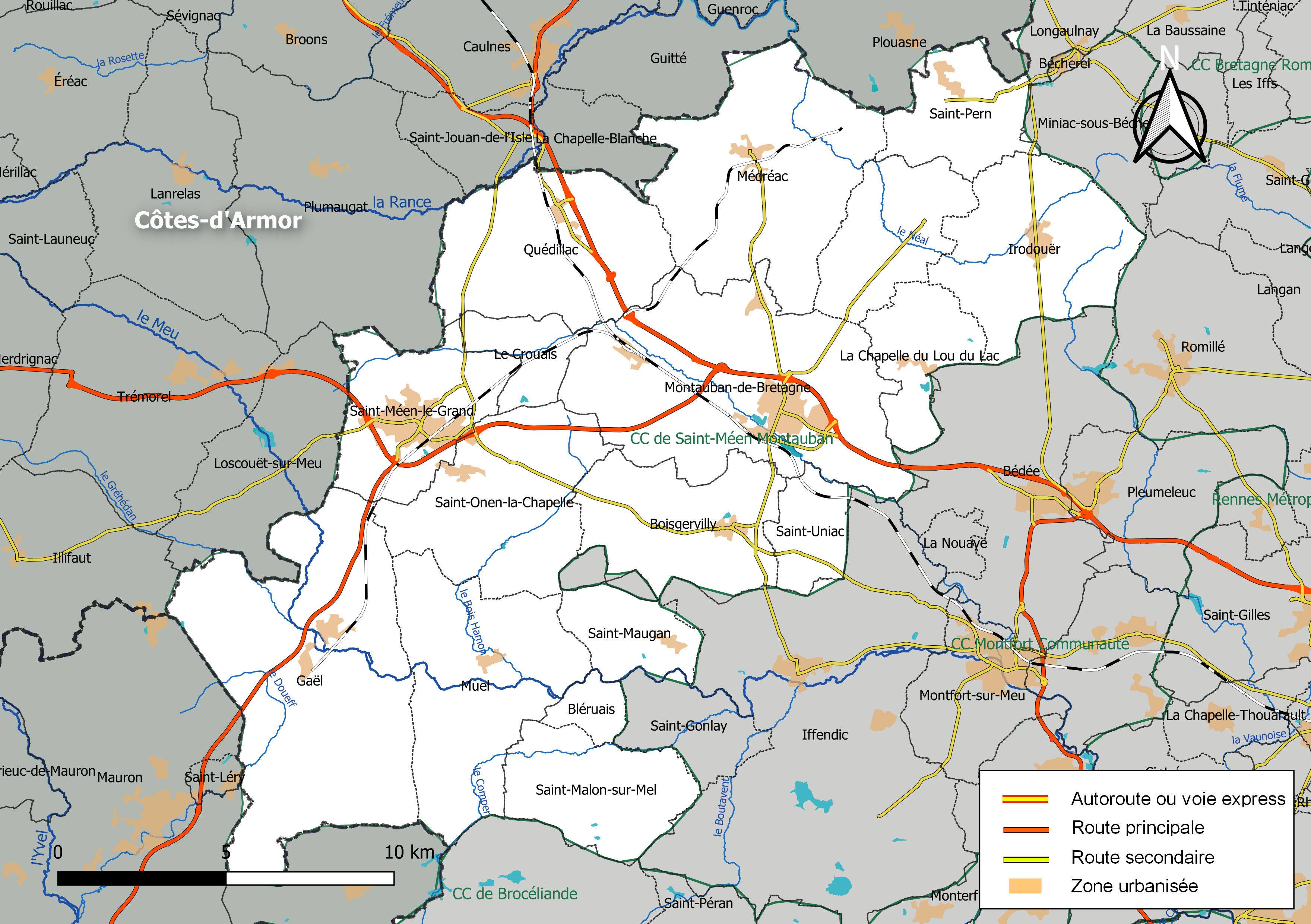 Carte géographique de la Communauté de communes de Saint-Méen Montauban, département d'Ille-et-Vilaine, France. Composition au 1er janvier 2019.